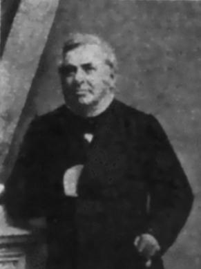 Portrait of Johann Lukas Schönlein.